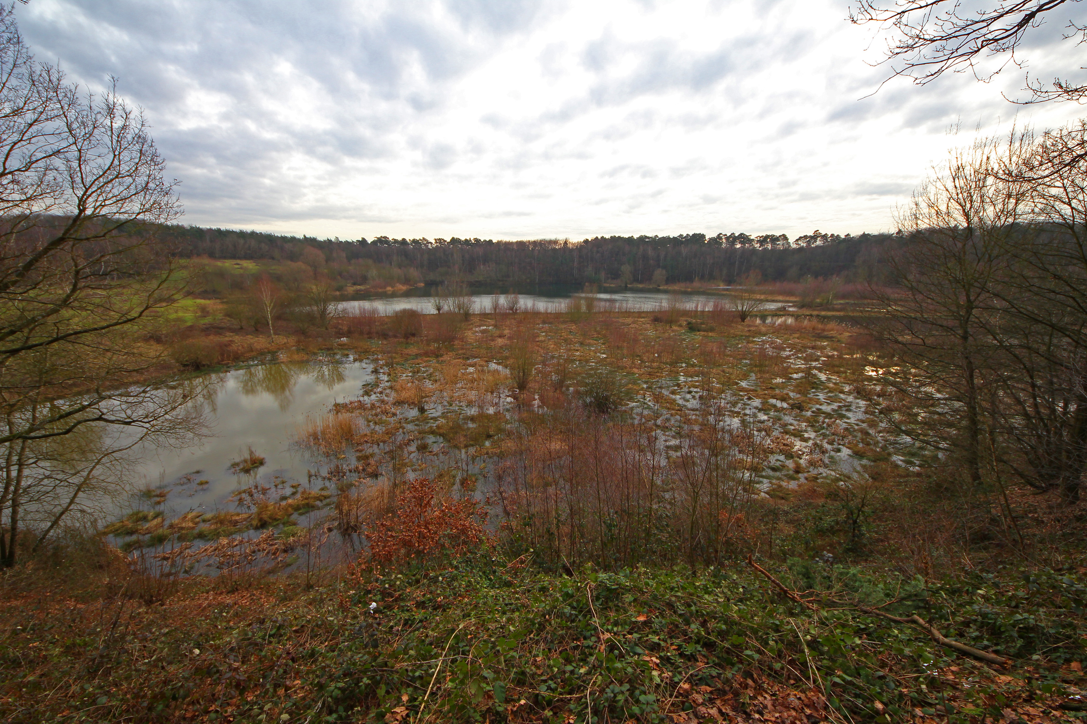 Naturschutzgebiet am Hornpottweg an der Grenze Köln/Leverkusen. Aussicht auf die Grube.